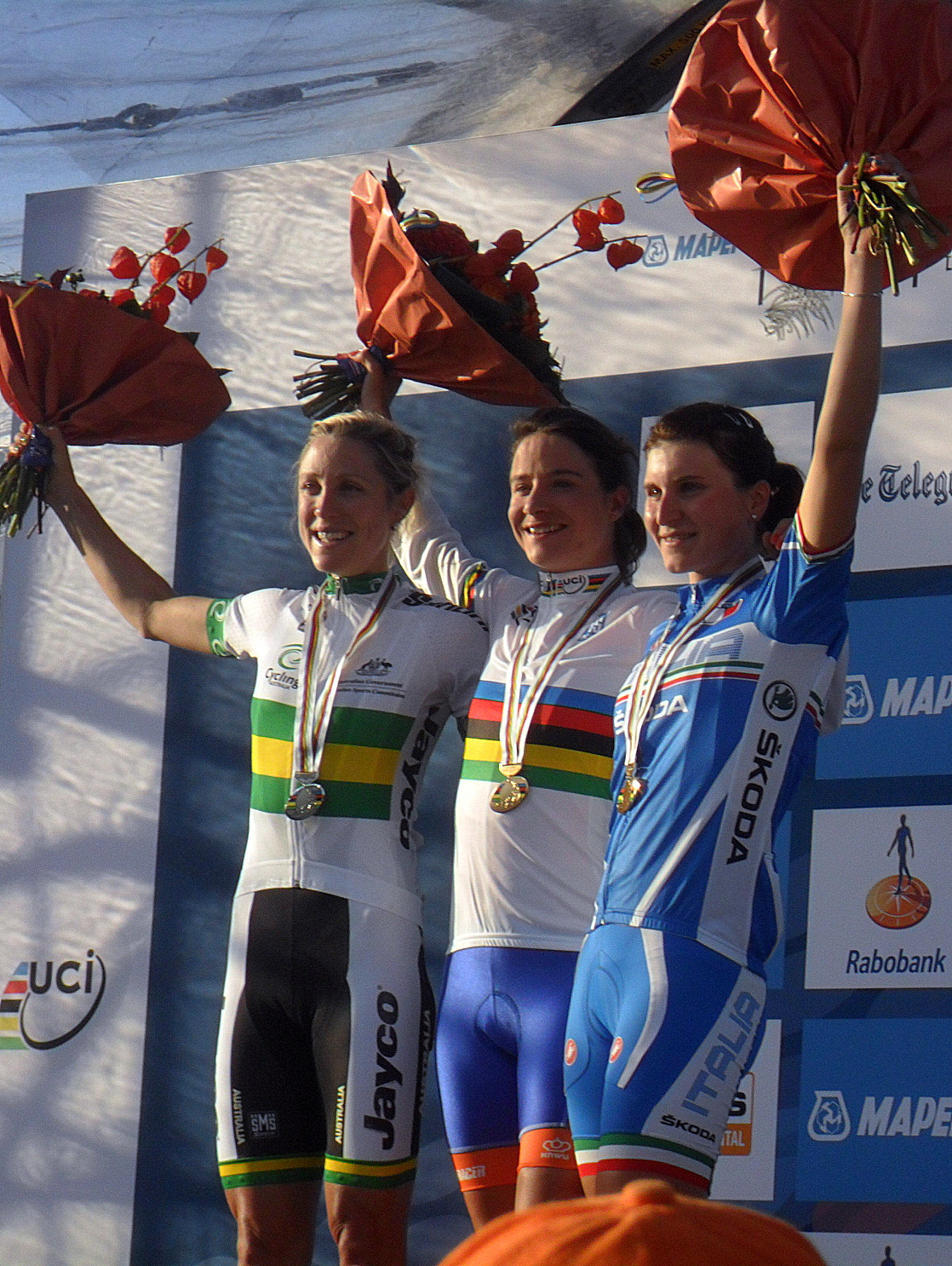 Podiumceremonie van het Wereldkampioenschap 2012 in Valkenburg, Nederland. 1. Marianne Vos, Nederland 2. Rachel Neylan, Australië 3. Elisa Longo Borghini, Italië